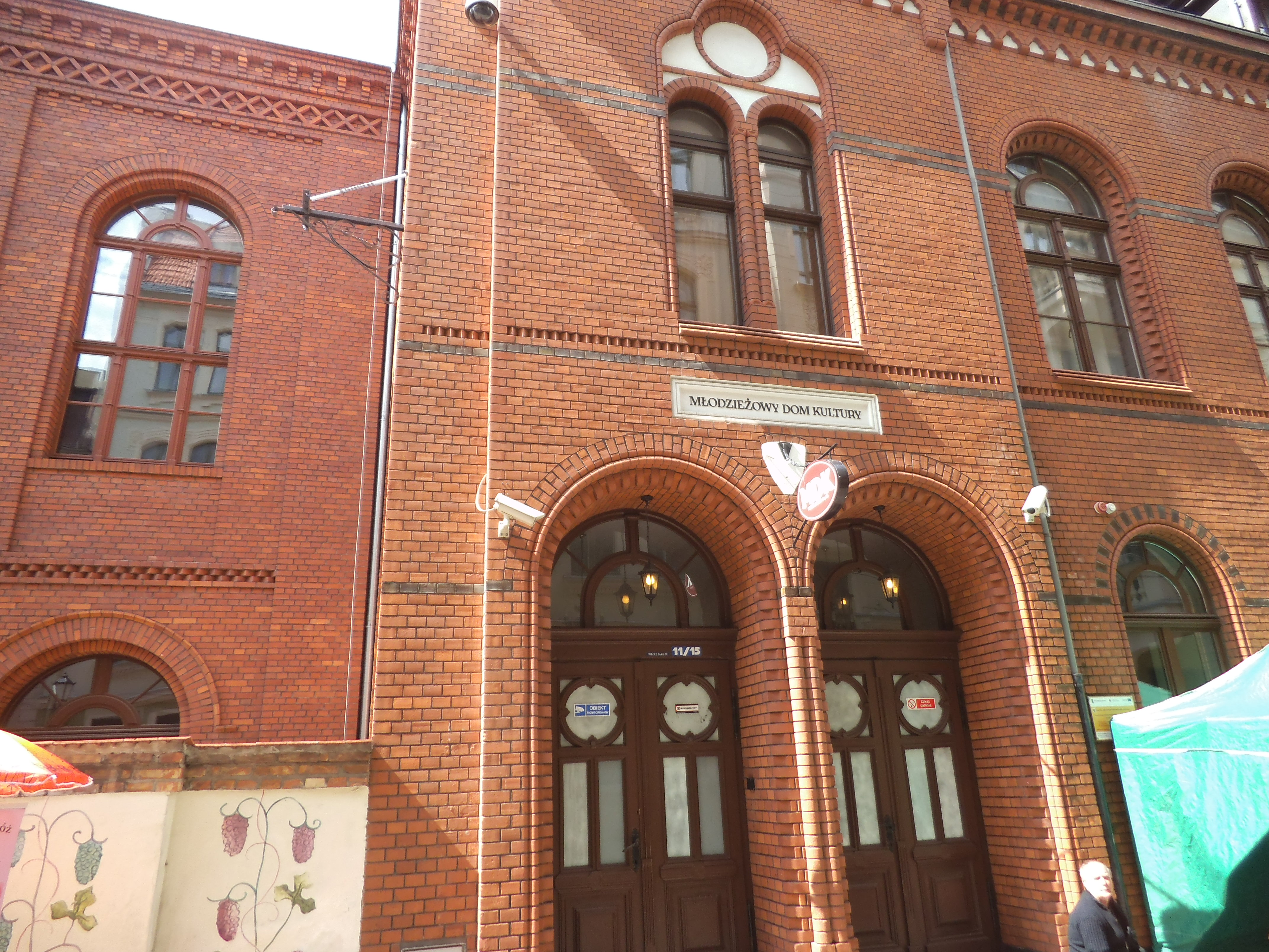 Młodzieżowy Dom Kultury w Toruniu77